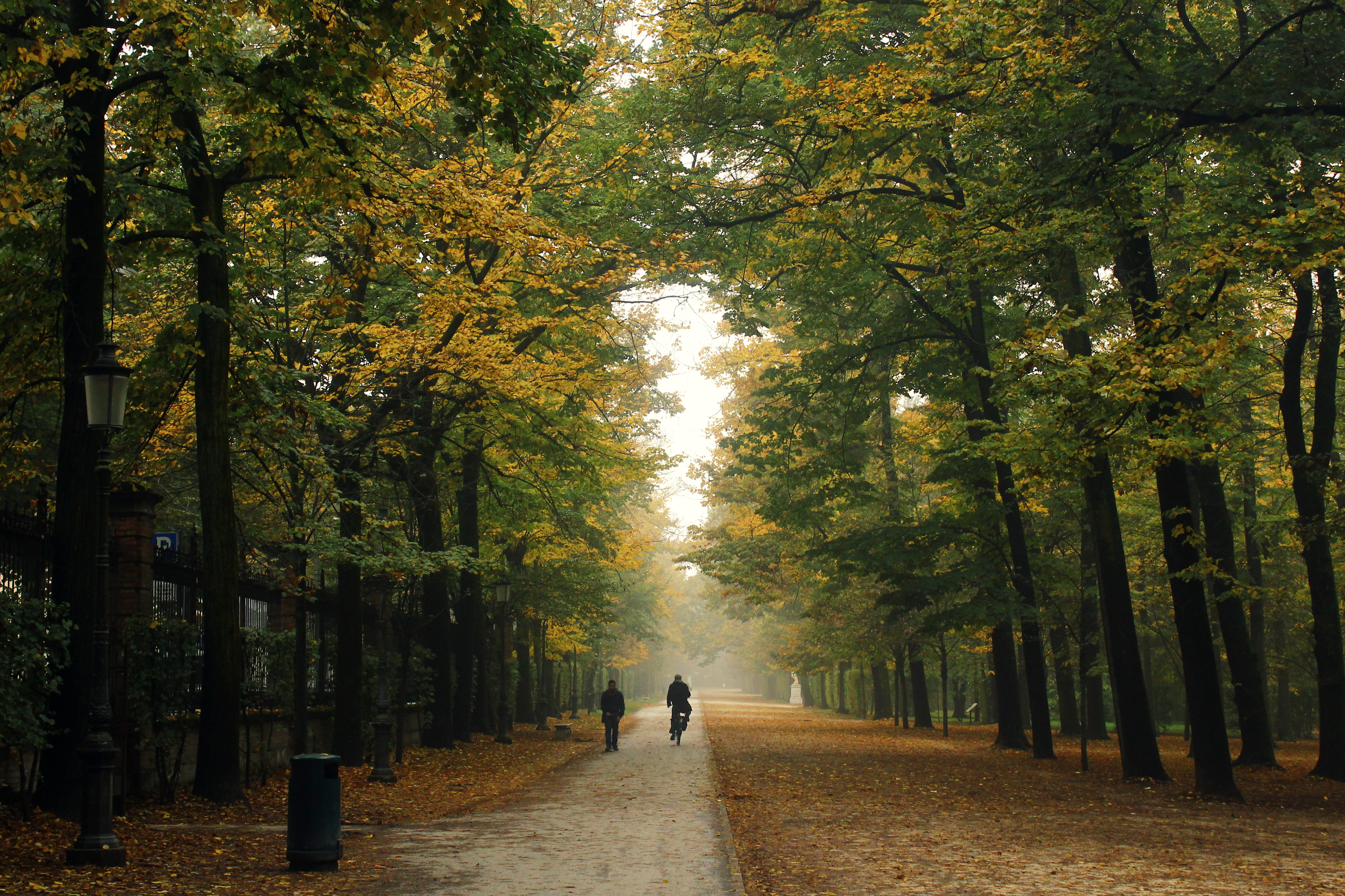 Parco Ducale - ID 034027624 This is a photo of a monument which is part of cultural heritage of Italy.